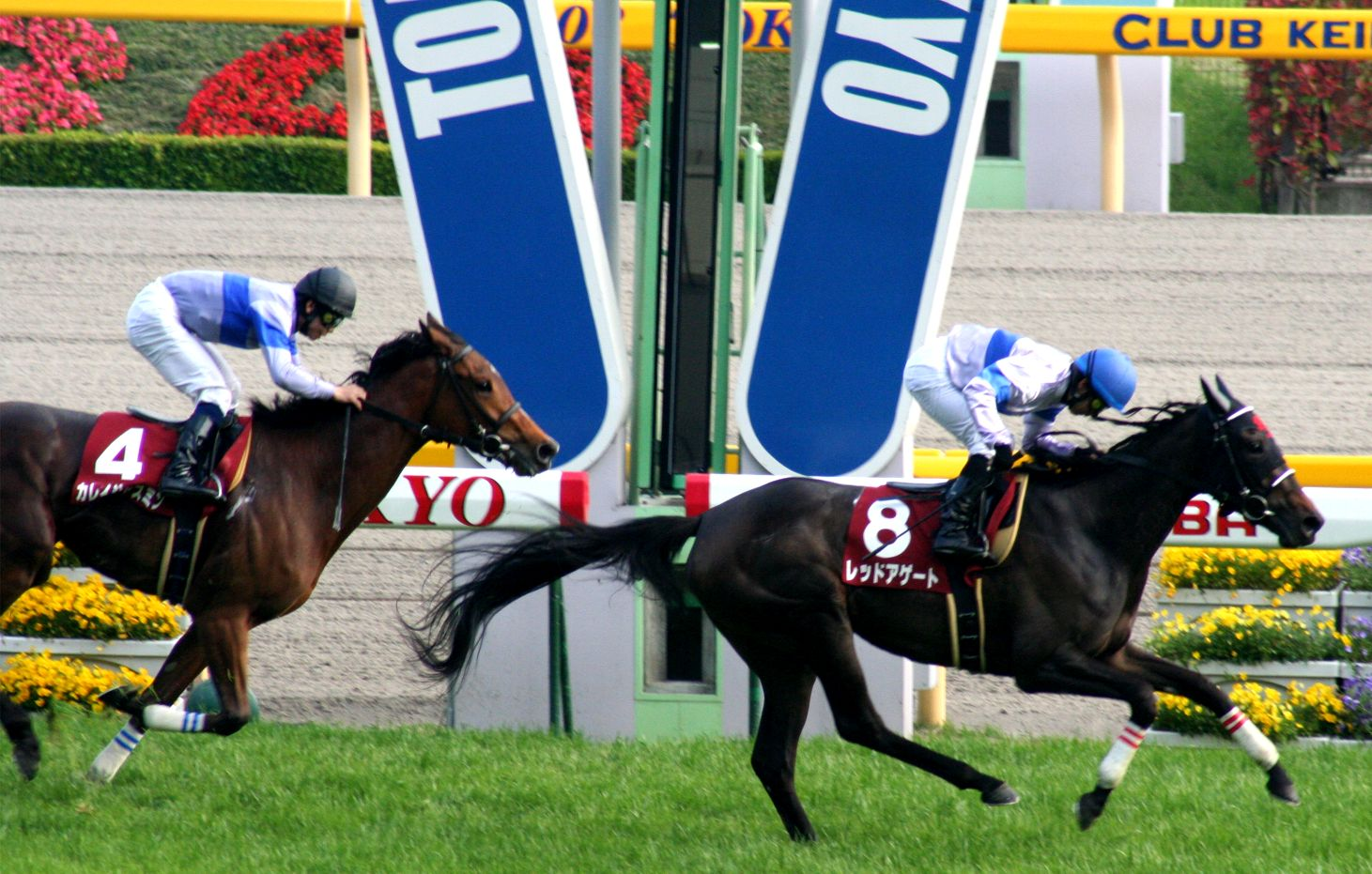 第43回フローラステークス